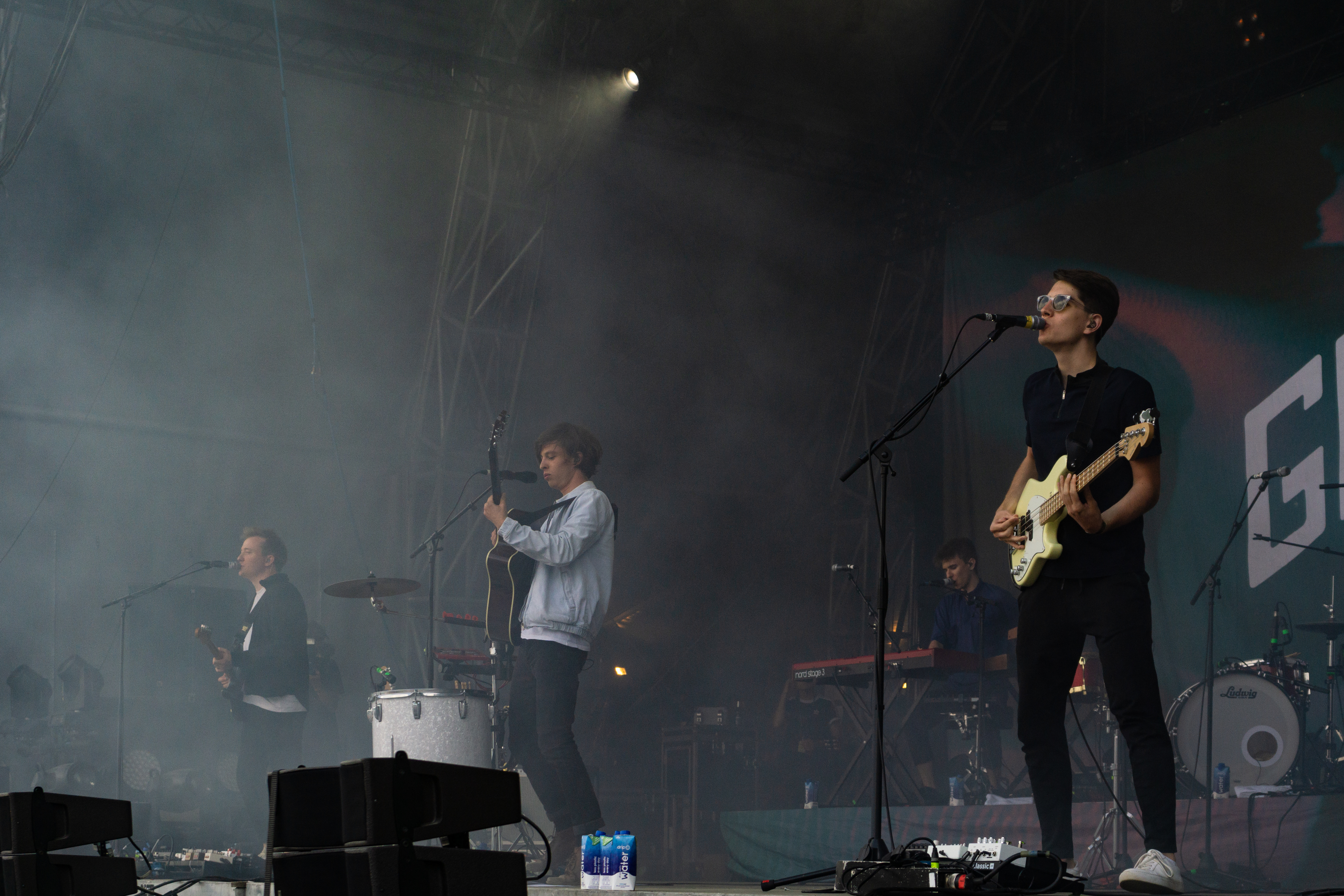 Die Giant Rooks auf dem Kosmonaut Festival 2019 in Chemnitz. Spielort MainStage.